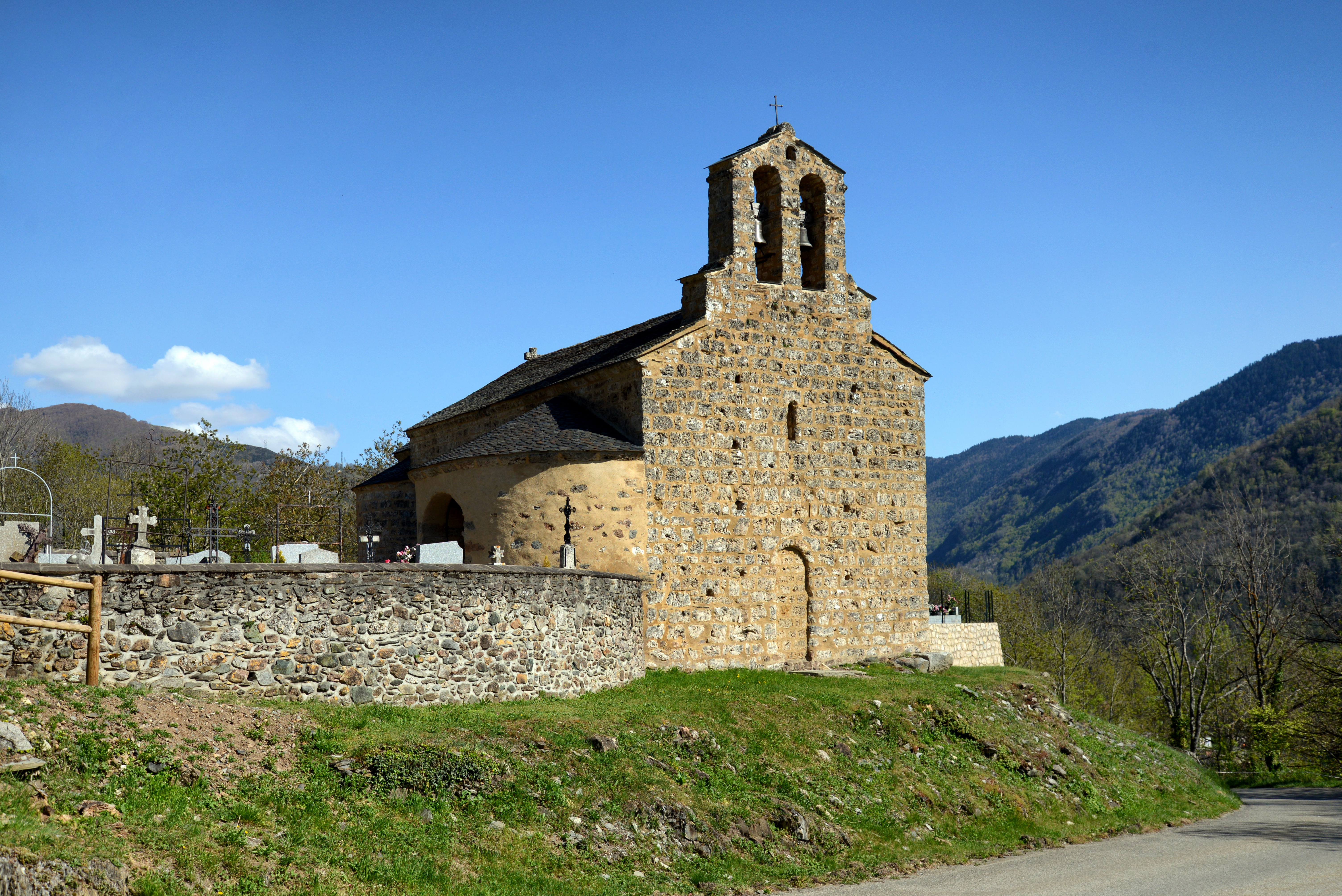 Vernaux, Ariège (Midi-Pyrénées) - Église Sainte-Marthe, du XIIe siècle, classée.